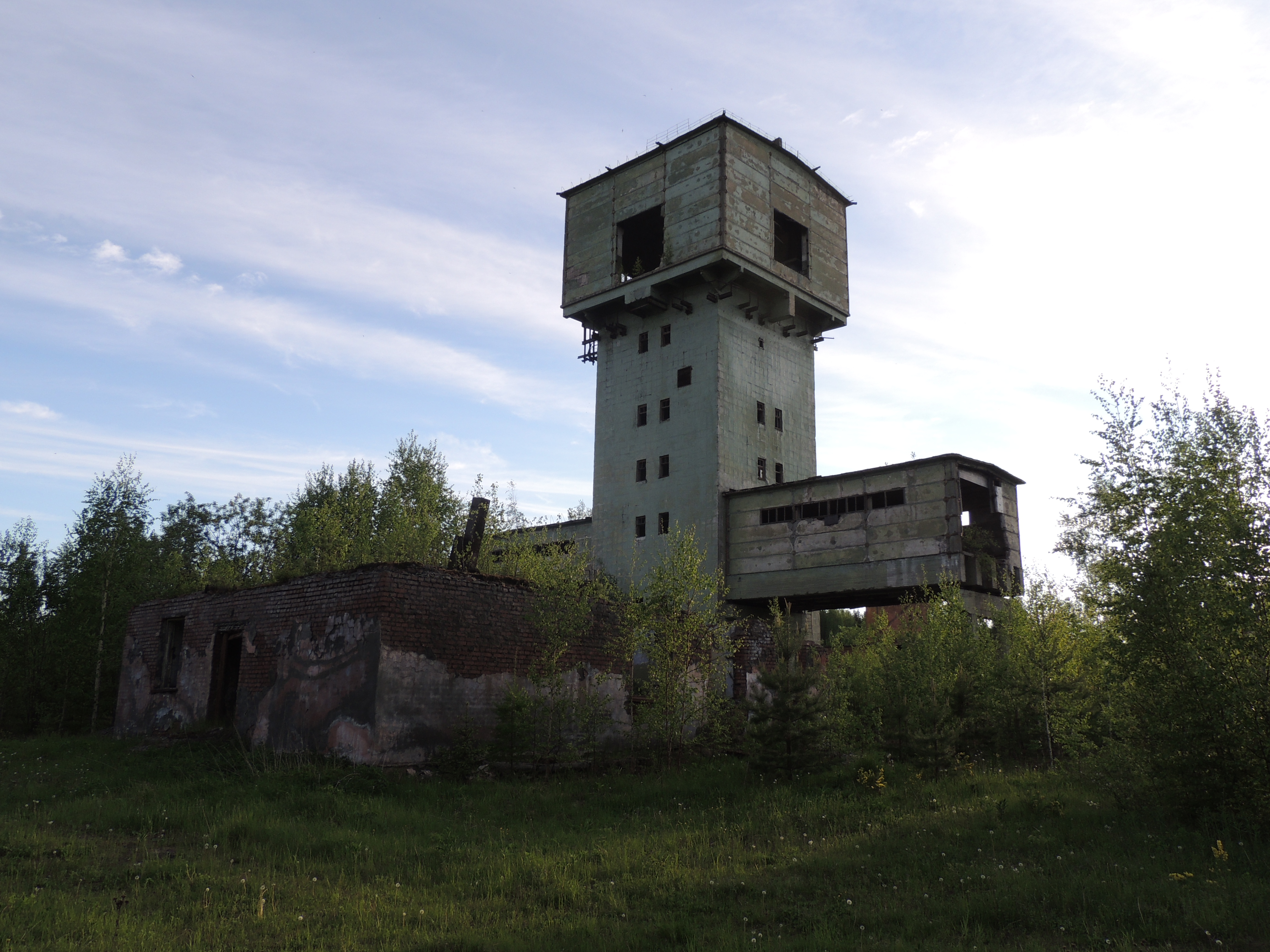 Заброшенная шахта Валуевская в городе Кушва